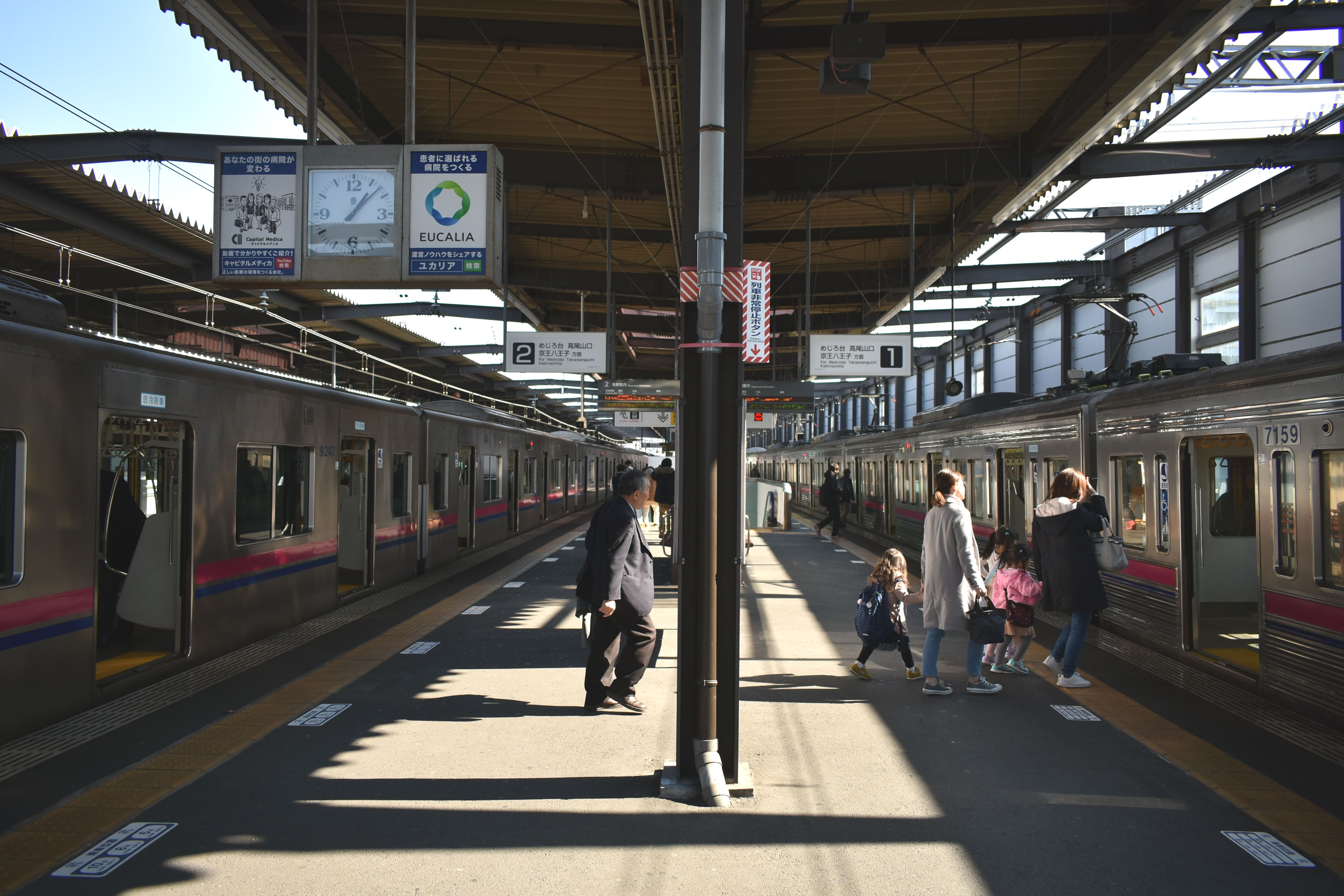 京王線 北野駅 Nikon D3400